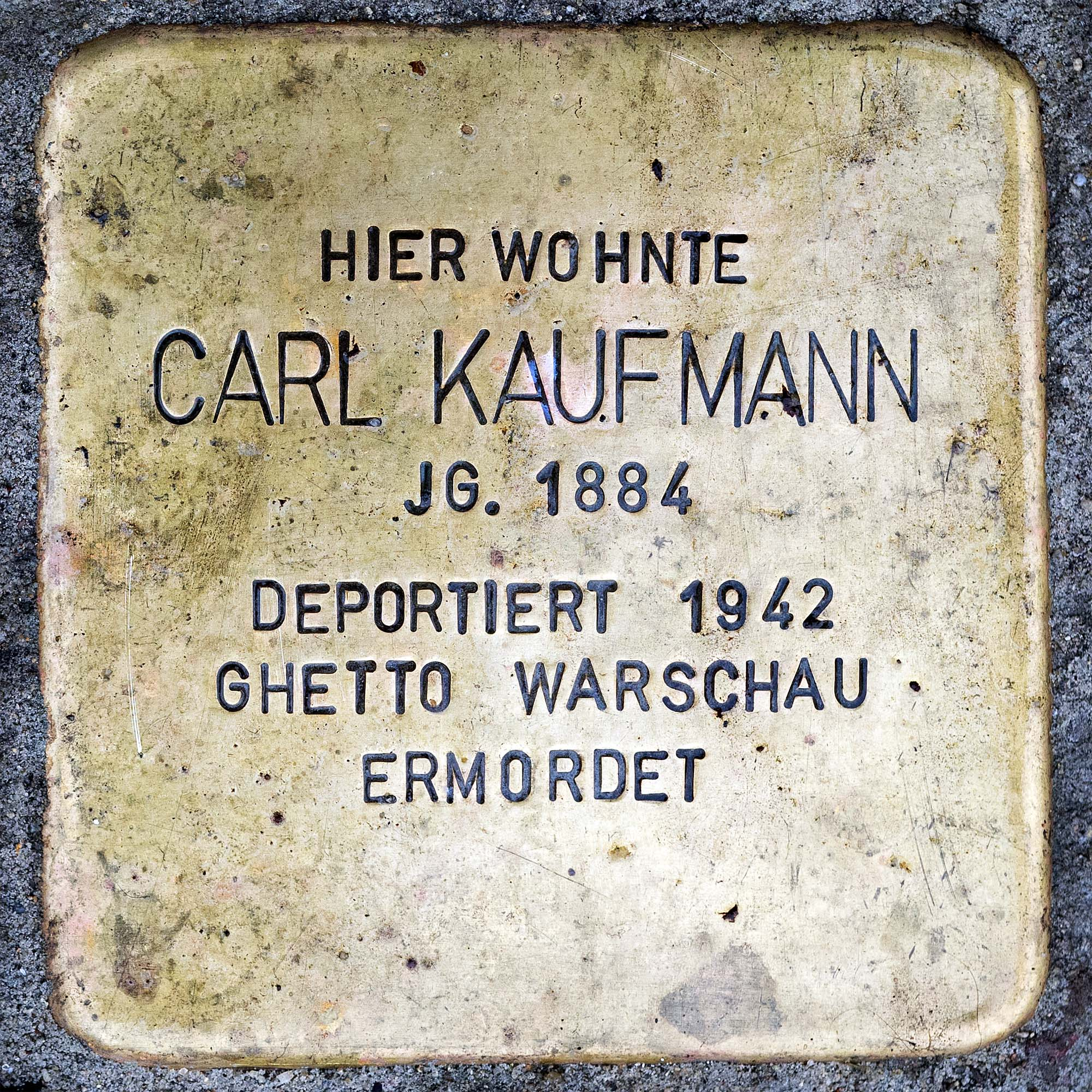 Stolperstein für Kaufmann Carl